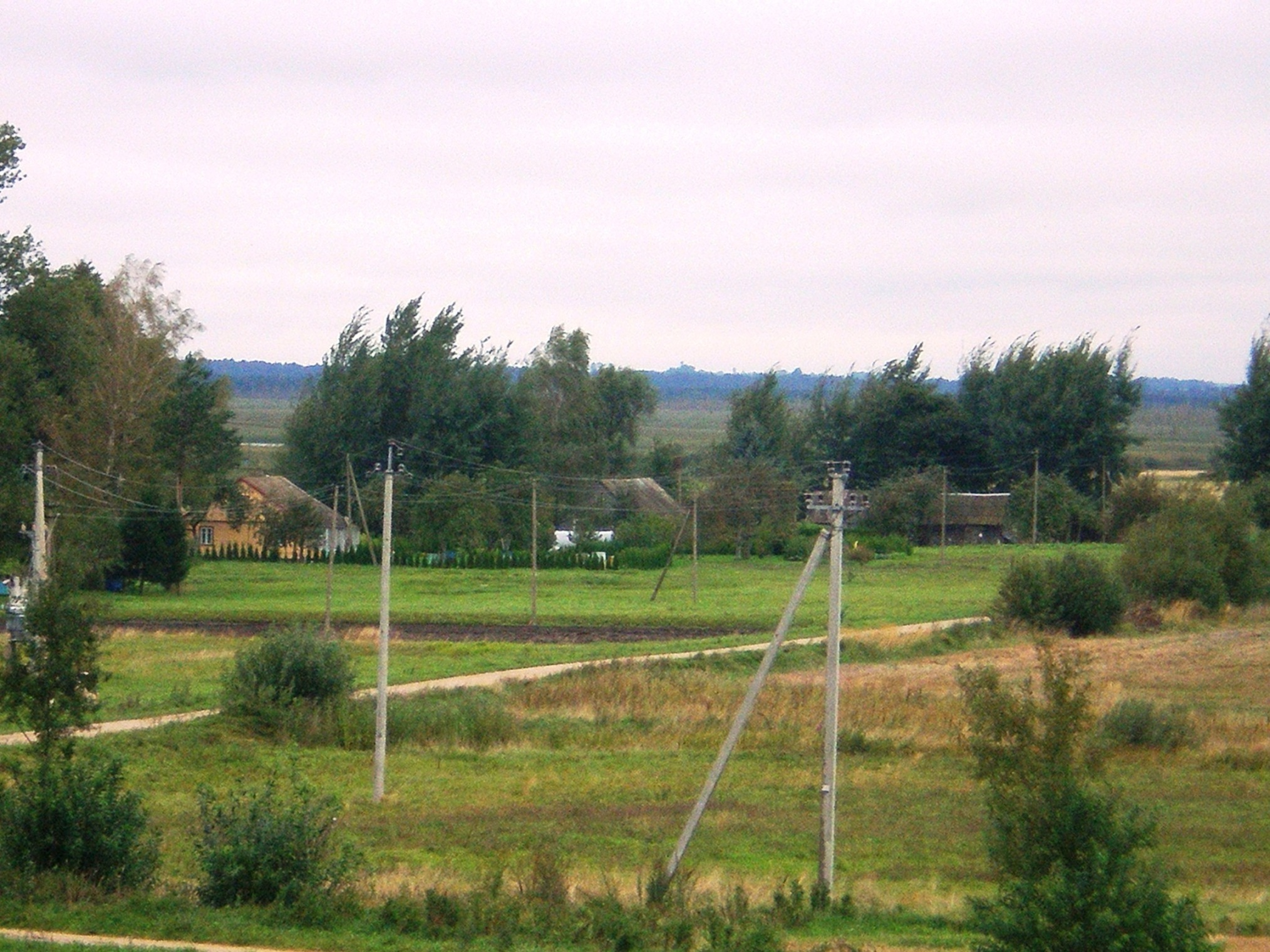 Aleknonys, Alytaus raj.